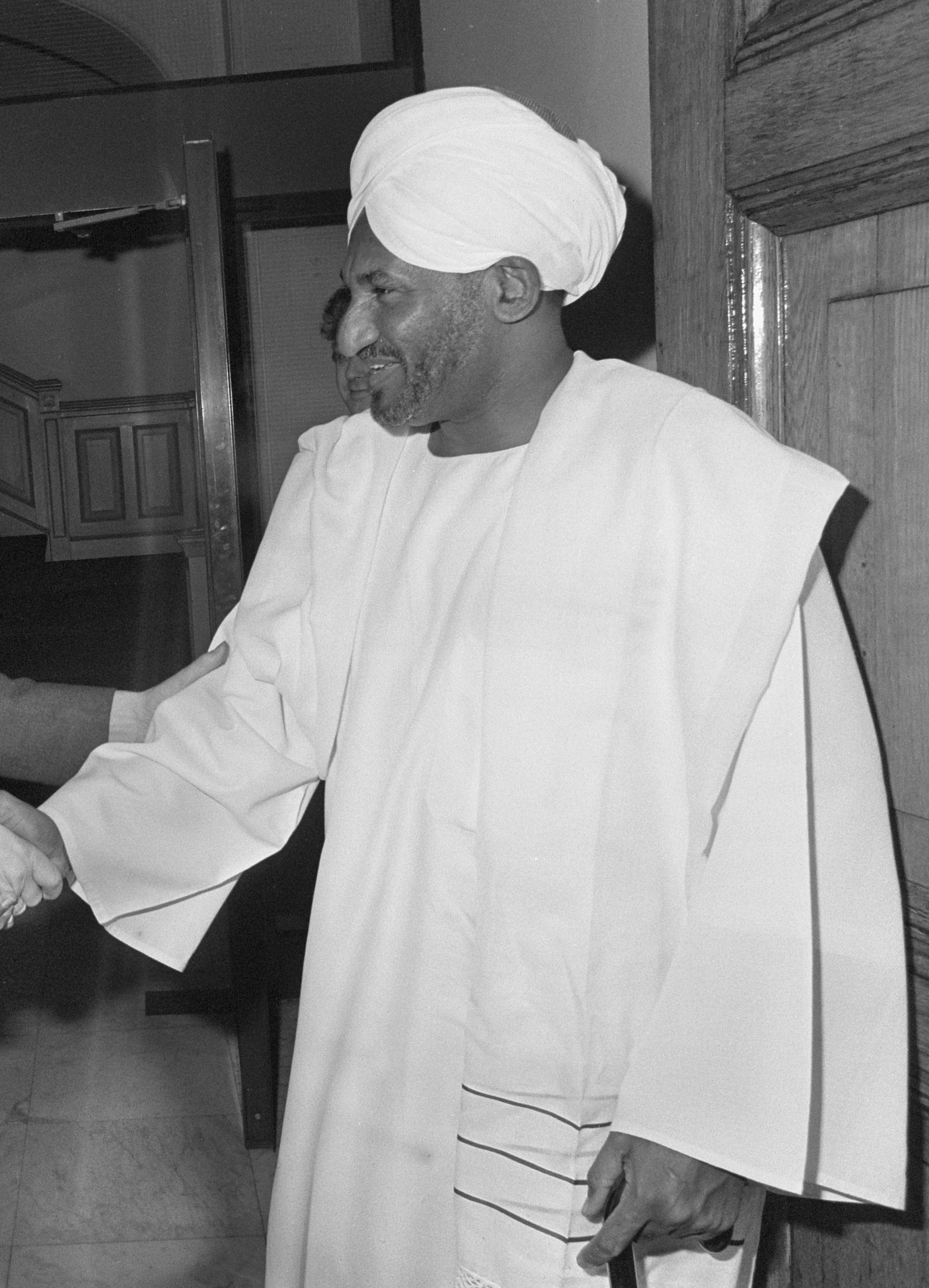 Minister president Sadek el Nahdi van Soedan tijdens werkbezoek aan Nederland